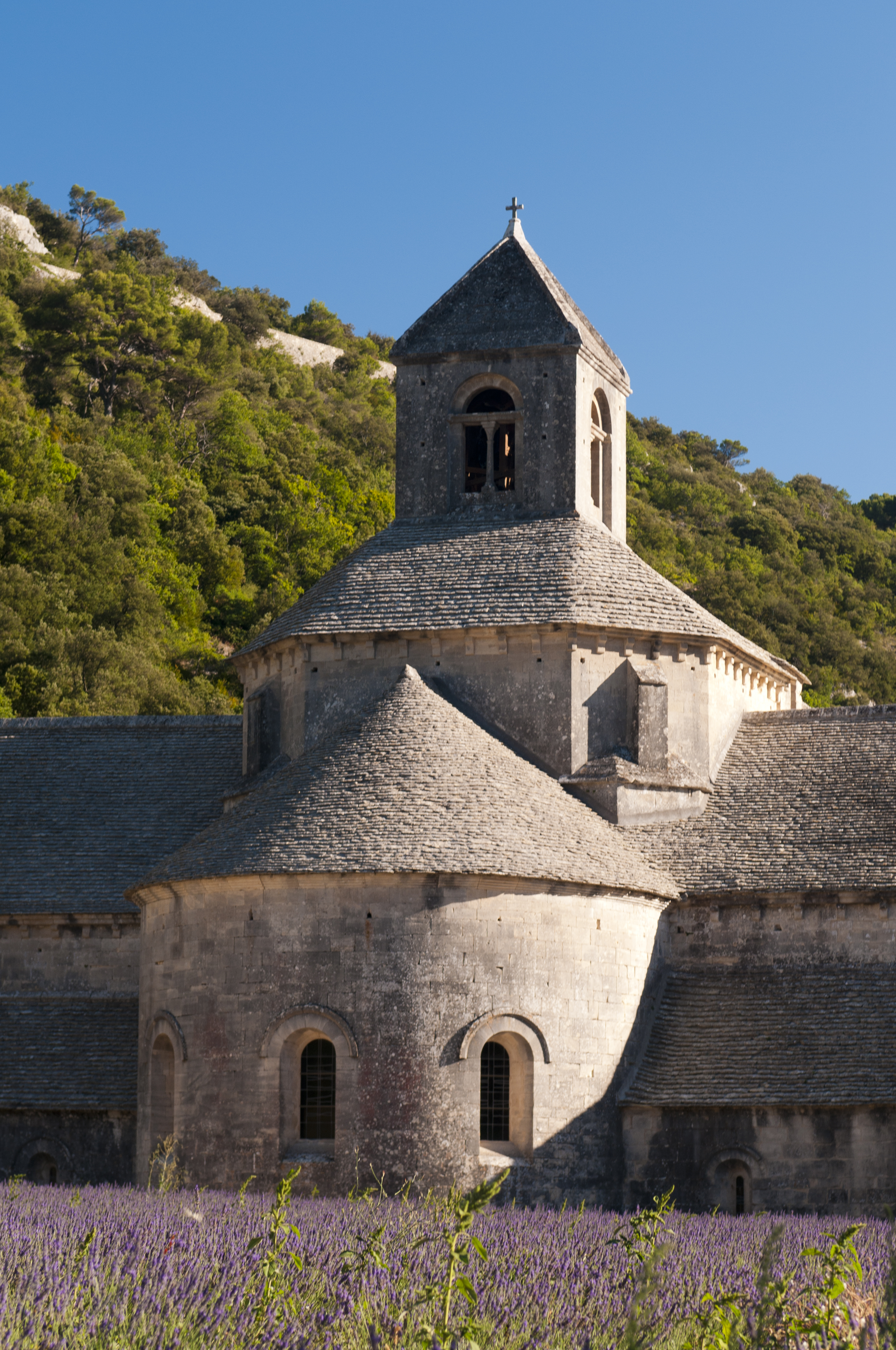 Abbaye Notre-Dame de Sénanque near Gordes, Provence, France